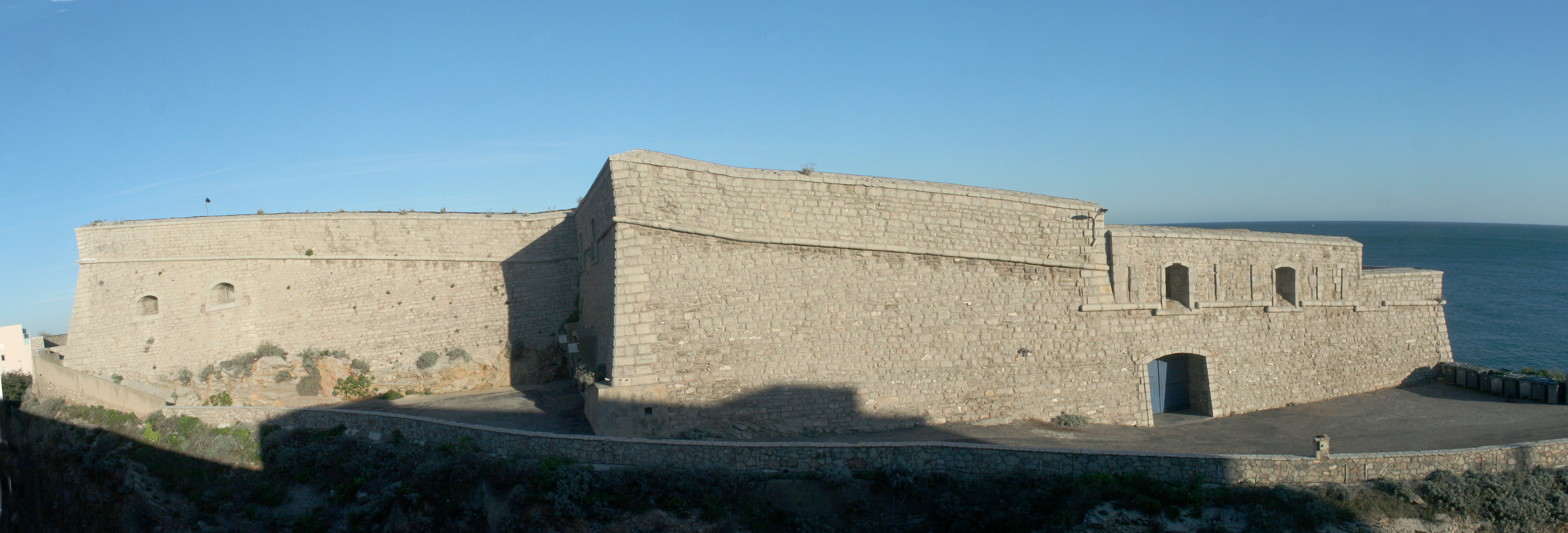 Sète (Hérault) - fort Saint-Pierre (1710-1711) construit par Antoine Niquet, aujourd'hui transformé en théâtre de la Mer.